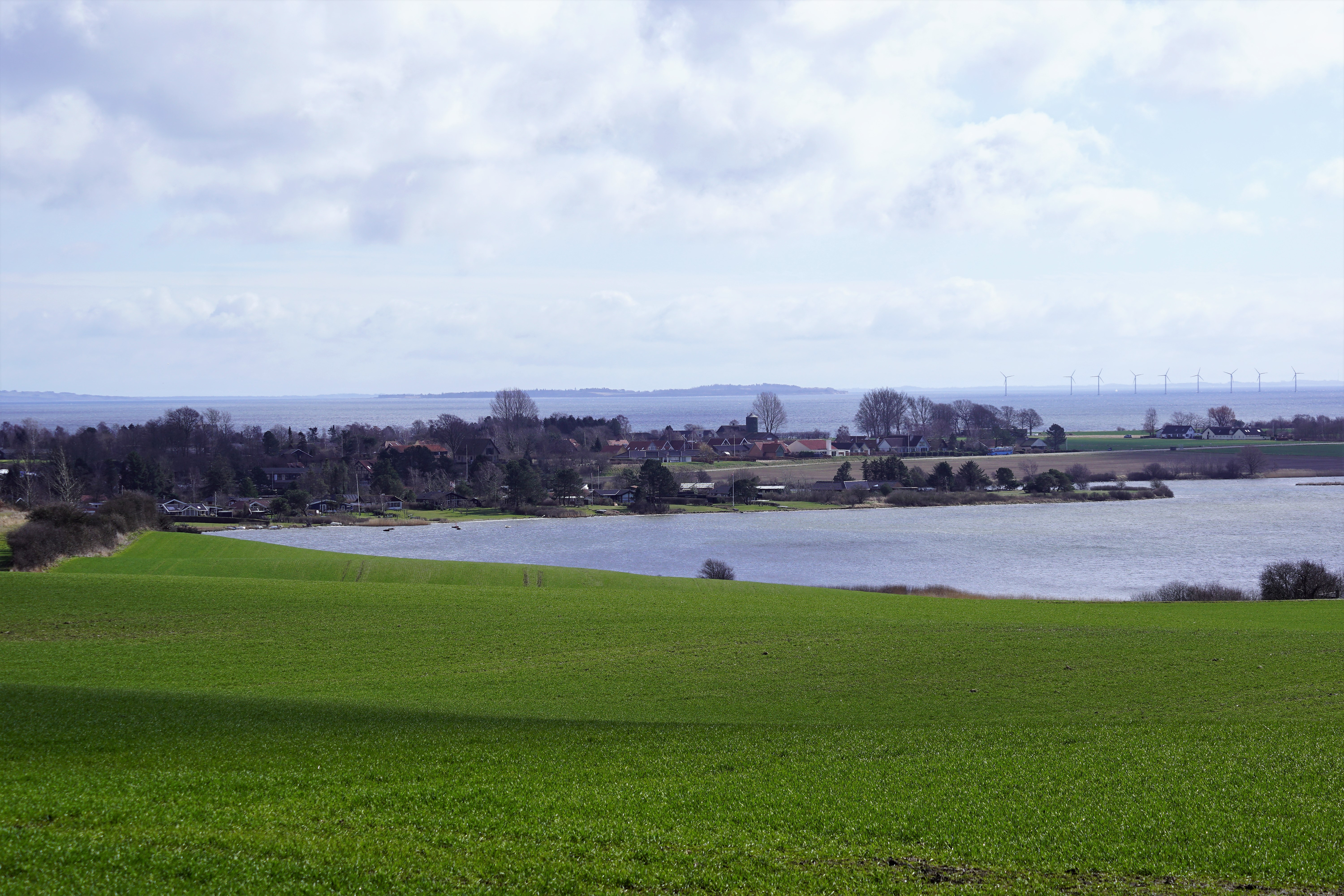 Norsminde set fra nordvest